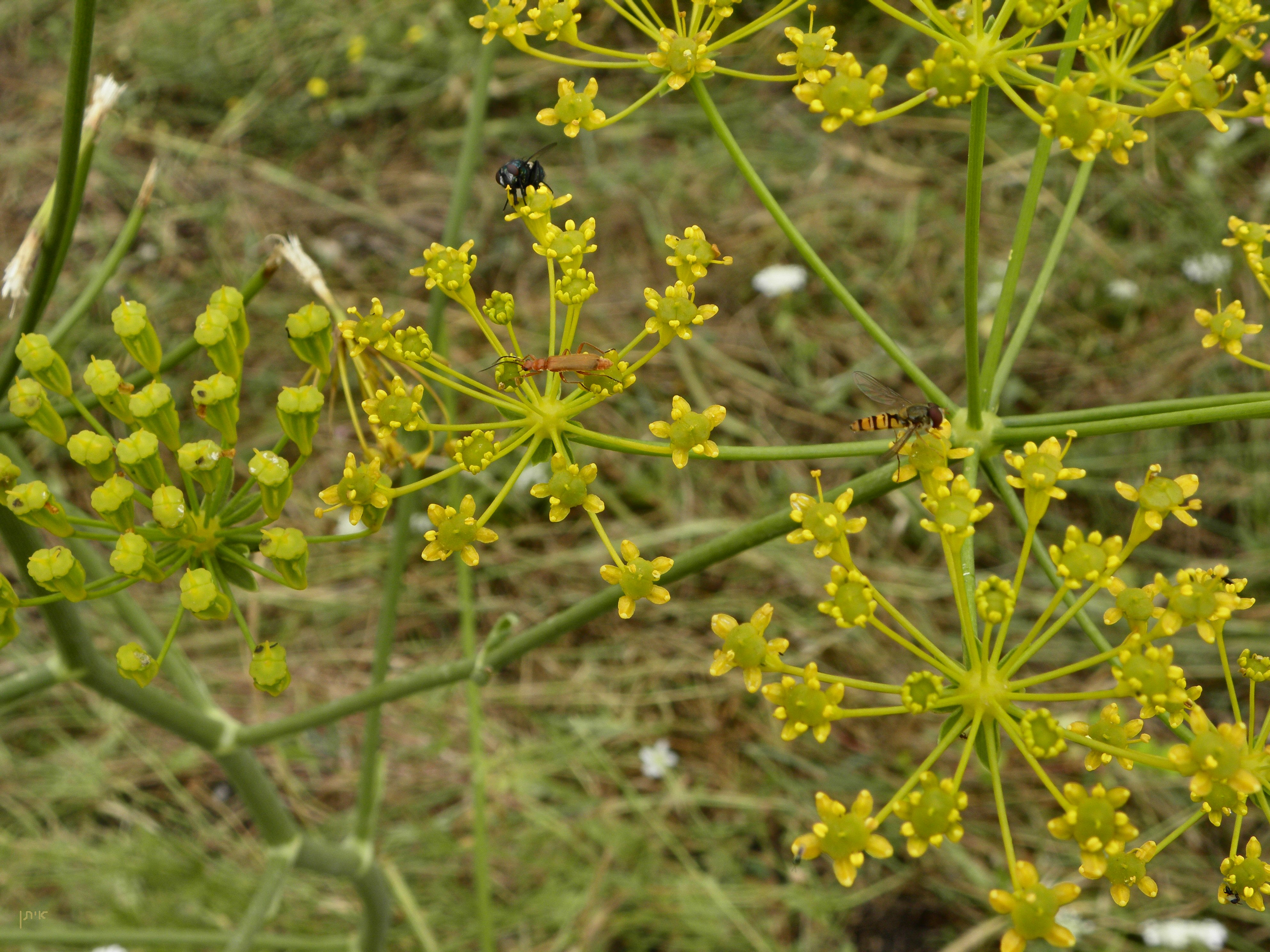 Heptaptera crenata (Heptaptera anisoptera) כנפה חרוקה